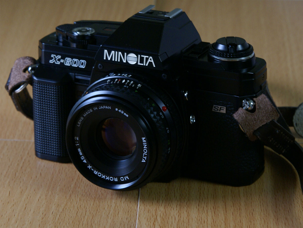 MINOLTA X-600